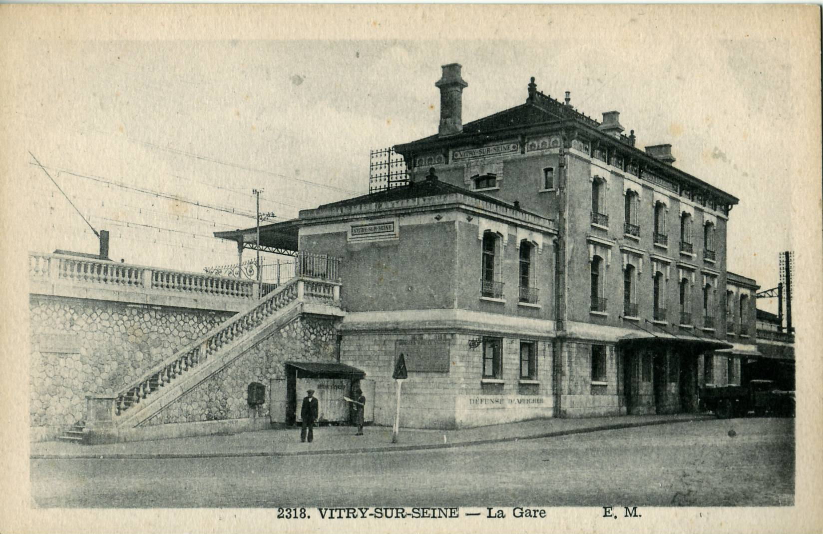 Carte postale ancienne éditée par EM N° 2318 VITRY-SUR-SEINE : La Gare